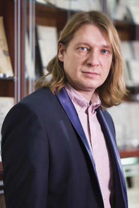 Српски (ћирилица): проф. др Владимир Марјански